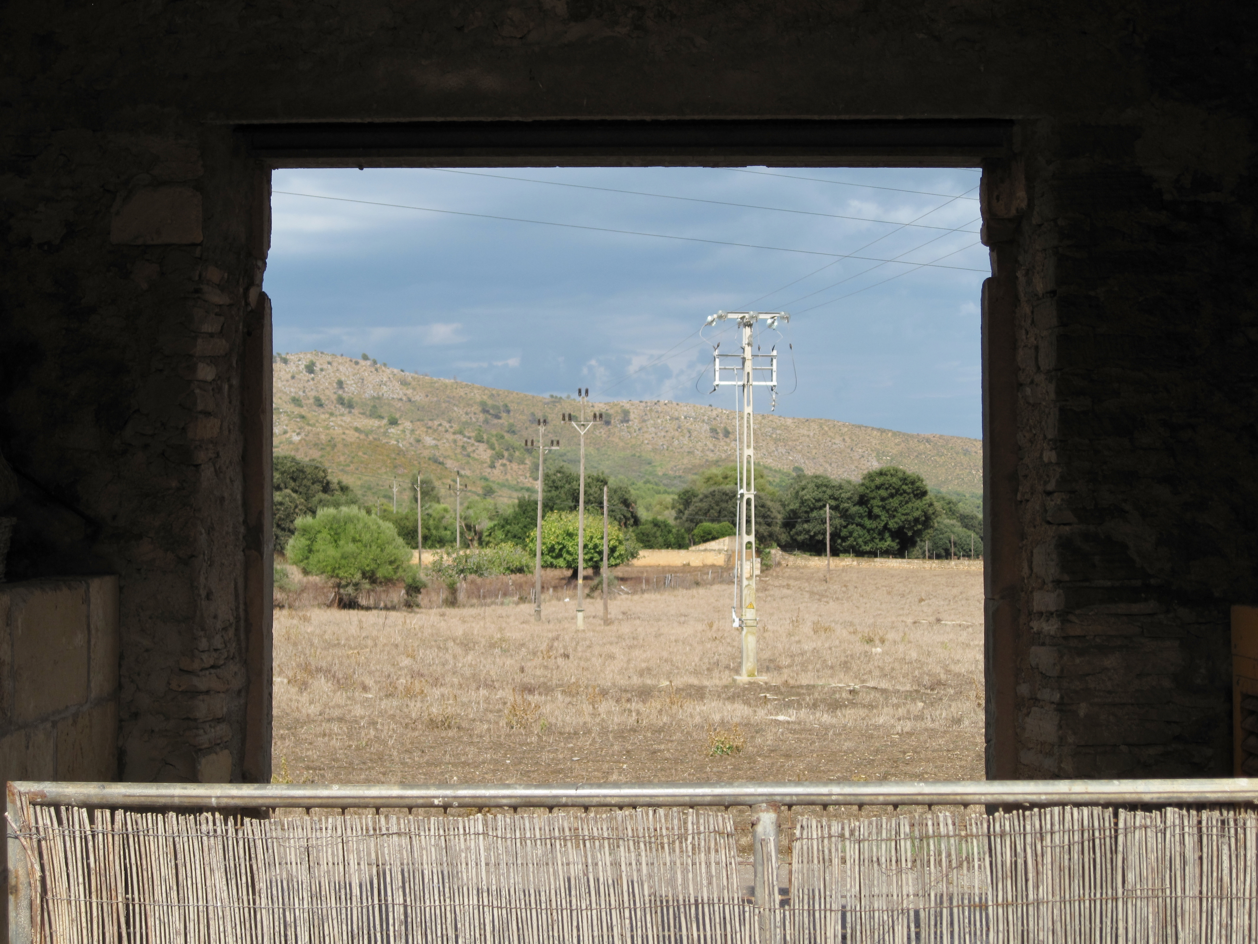 Blick auf die Felder hinter dem Turm von Canyamel (Torre de Canyamel), Gemeinde Capdepera, Mallorca, Spanien